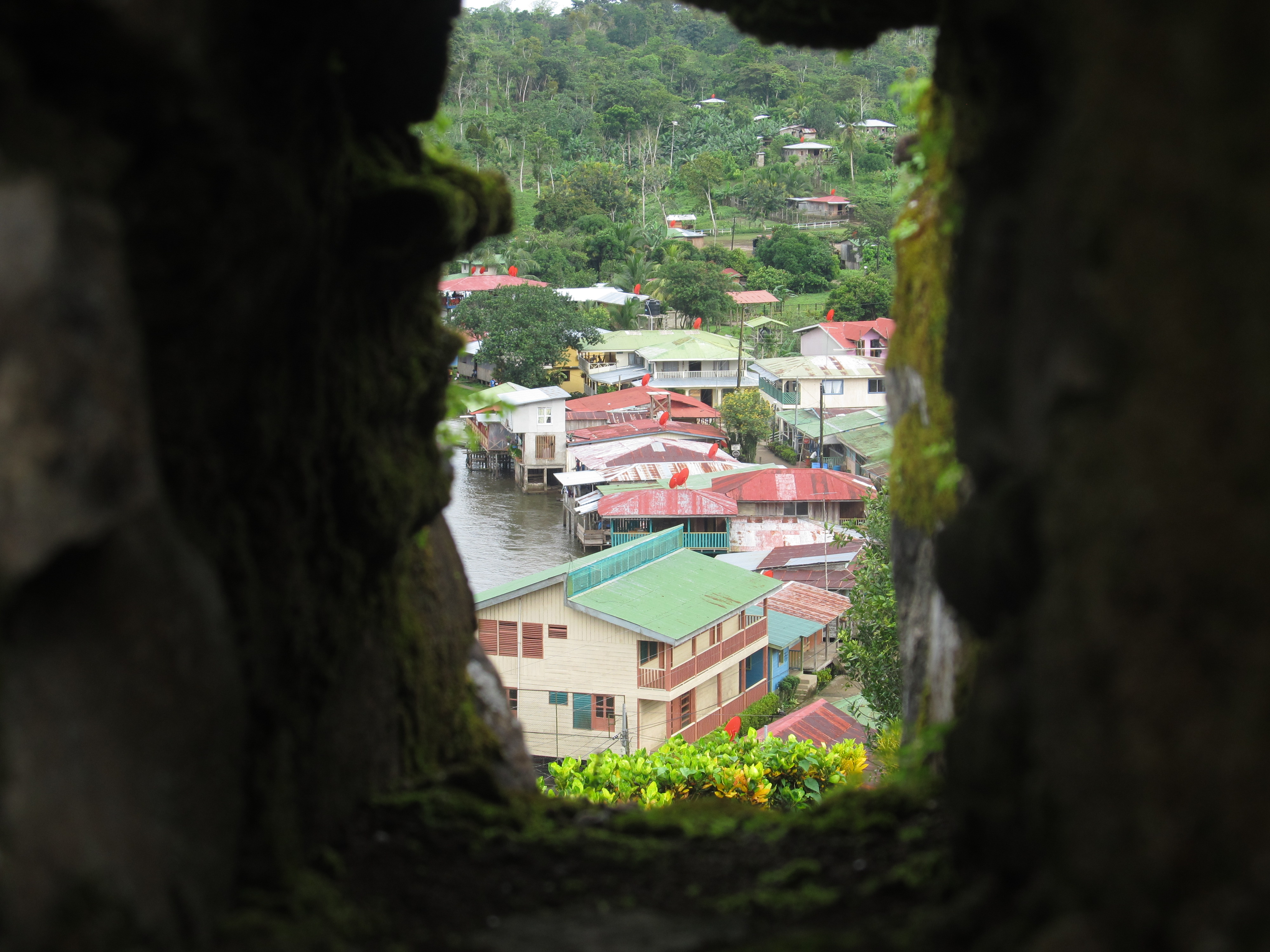 Blick auf El Castillo, Nicaragua.